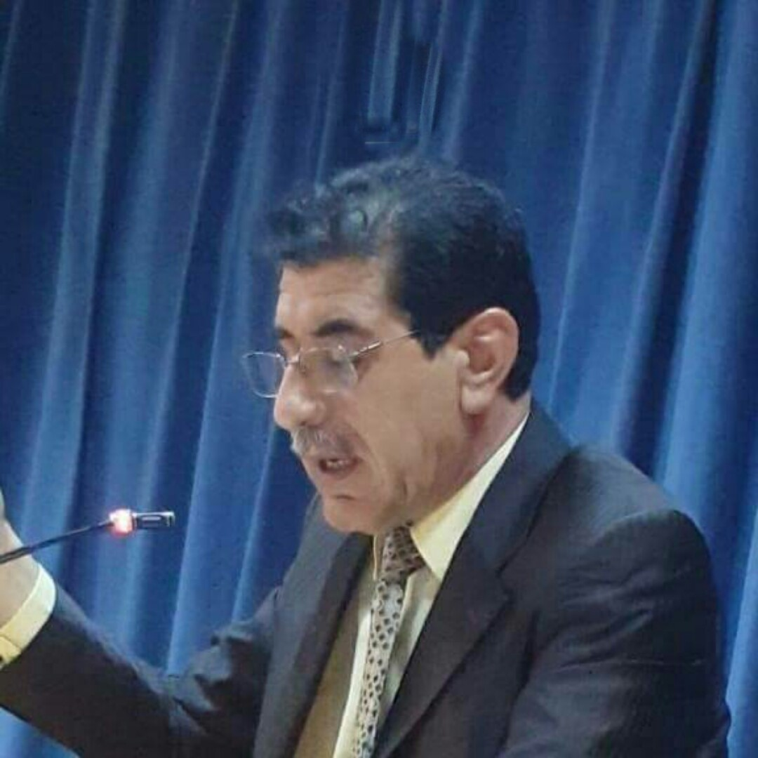 Abdullah Sleet photo